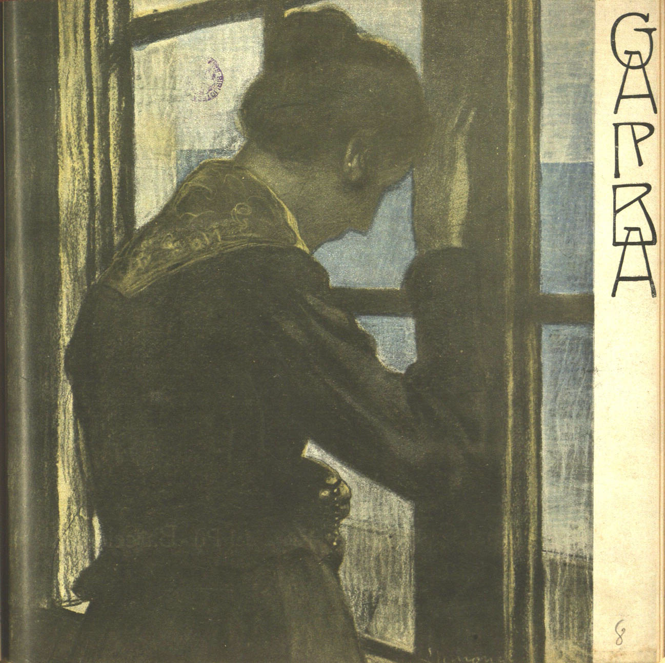 Garba (revista)